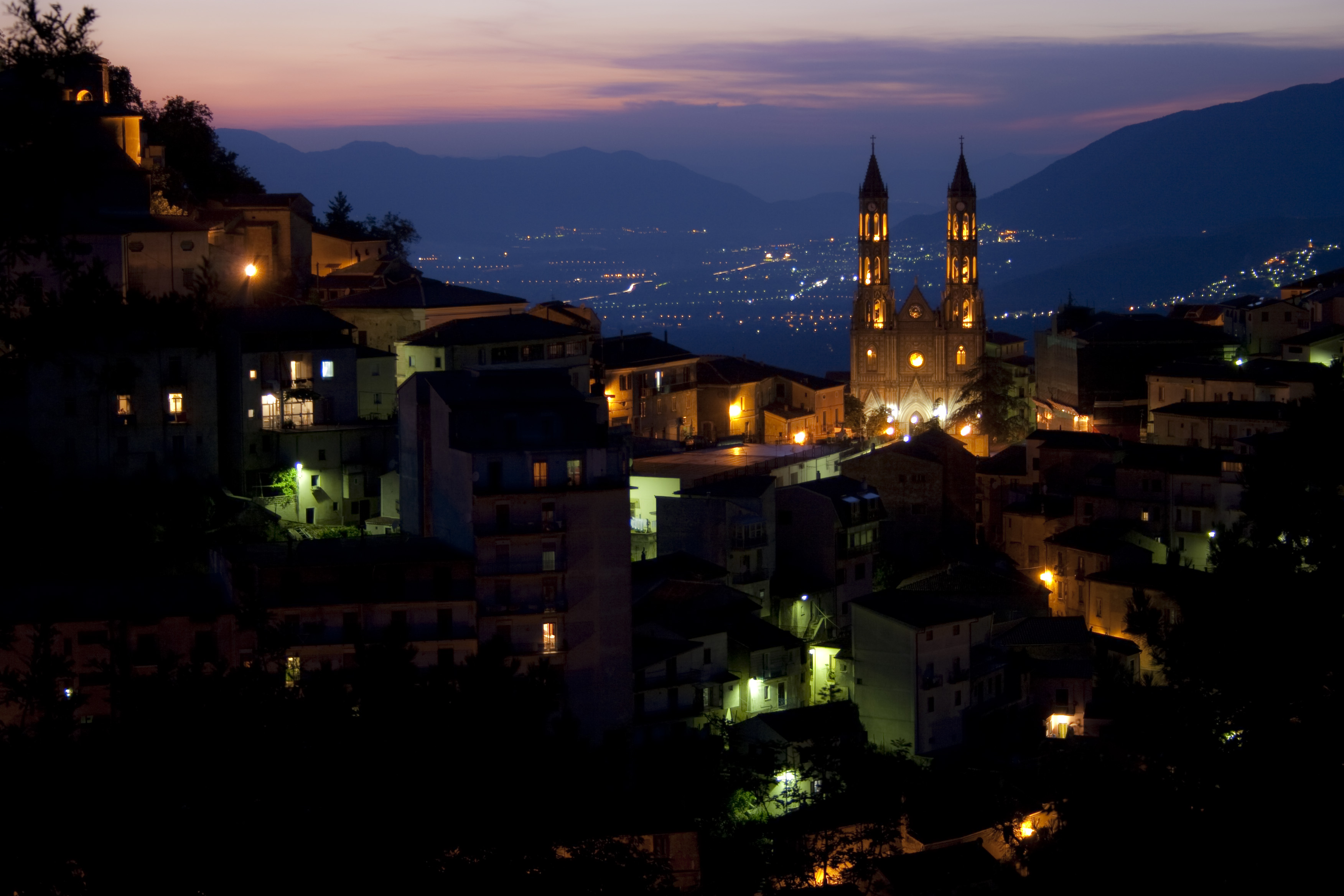 Foto notturna di Montesano sulla Marcellana (Salerno) il 12/08/2009